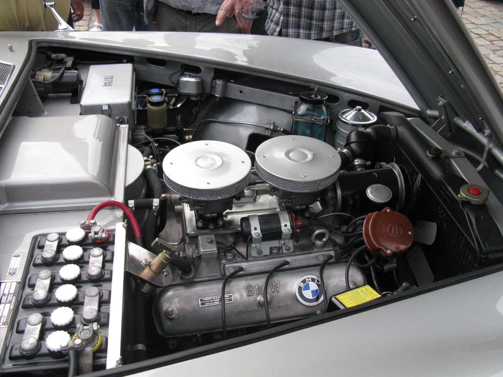 BMW 503 Coupé